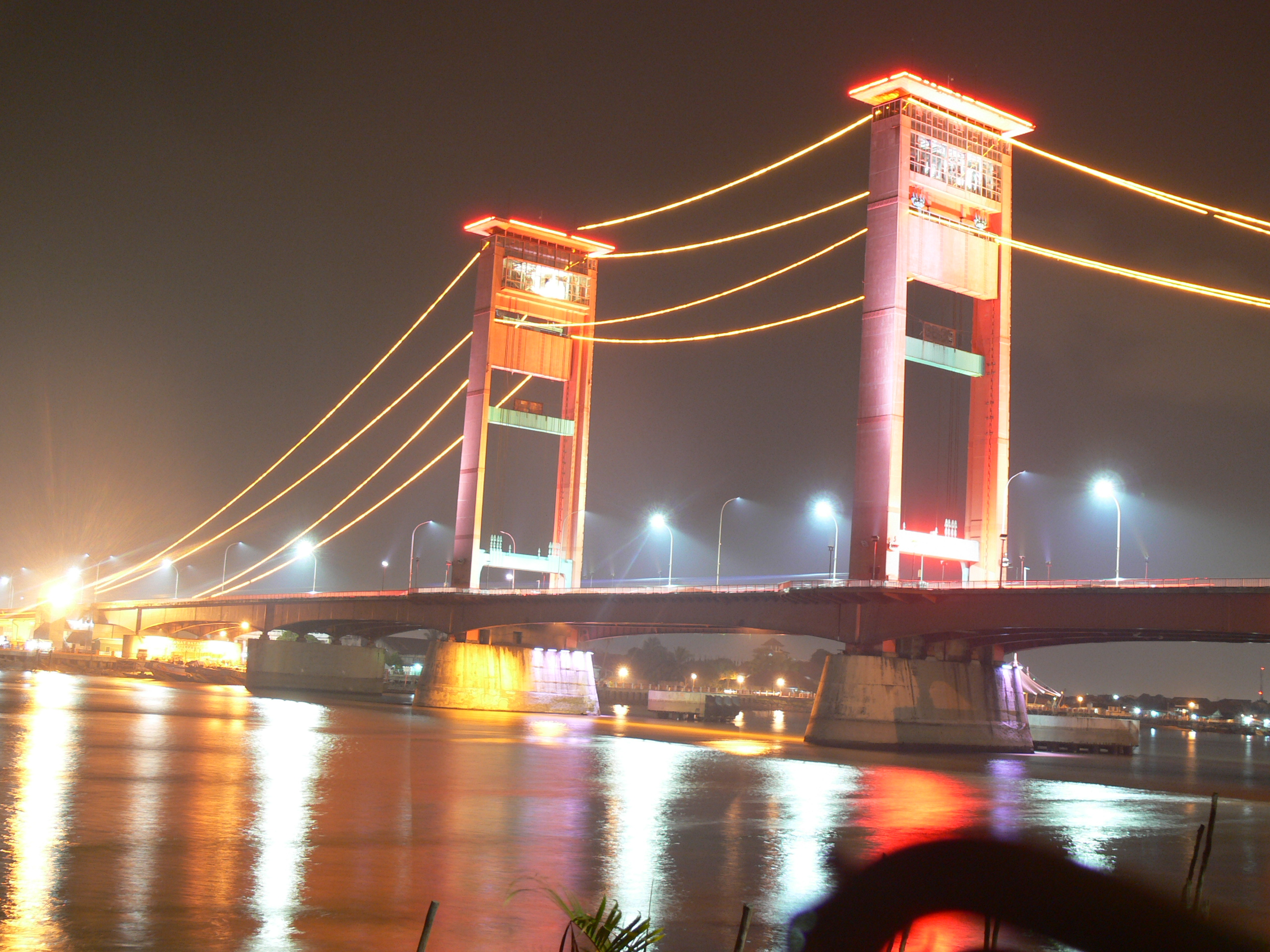 Ampera Palembang